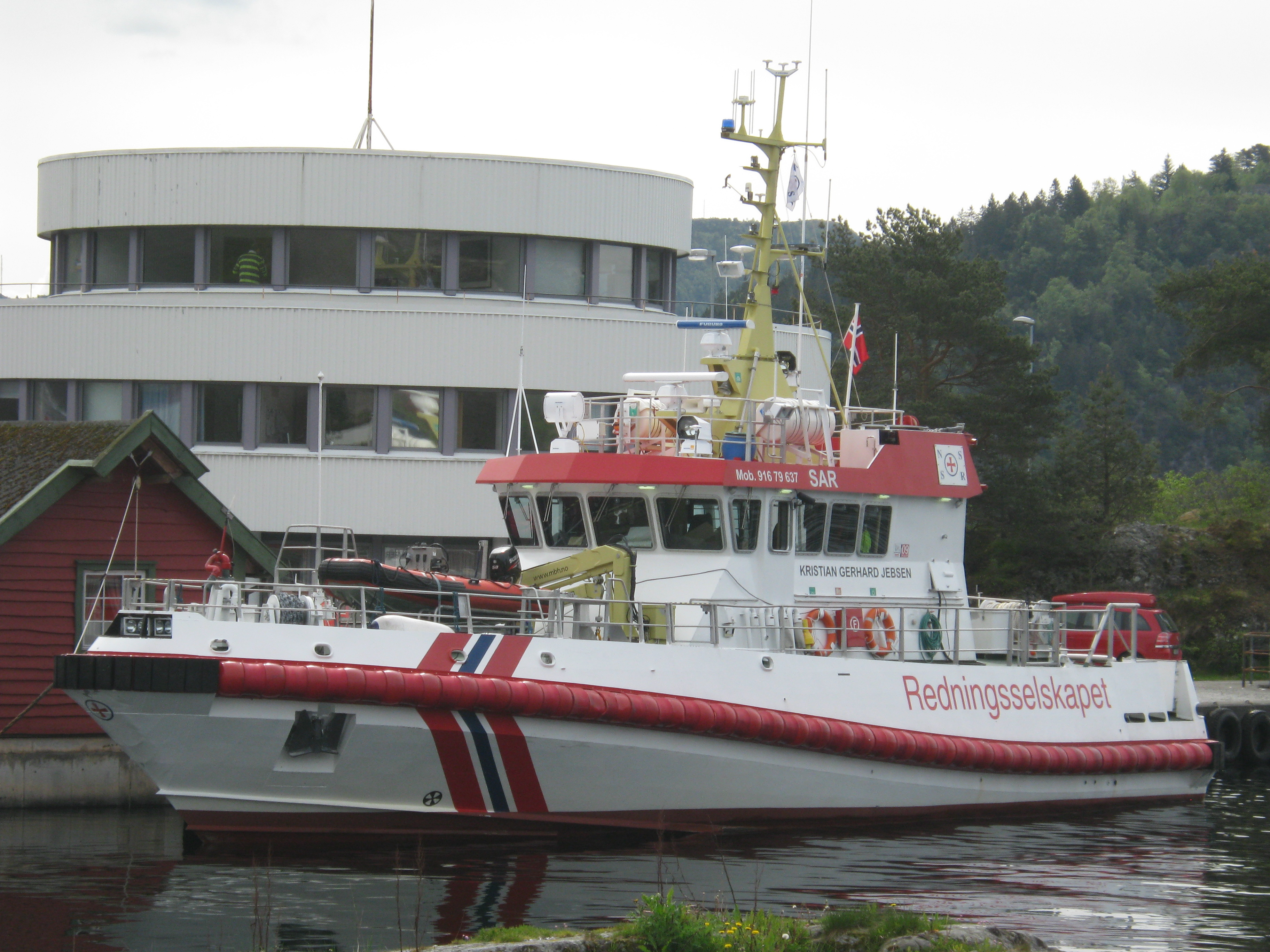 Redningsskøyten RS Kristian Gerhard Jebsen i Kleppestø på Askøy.